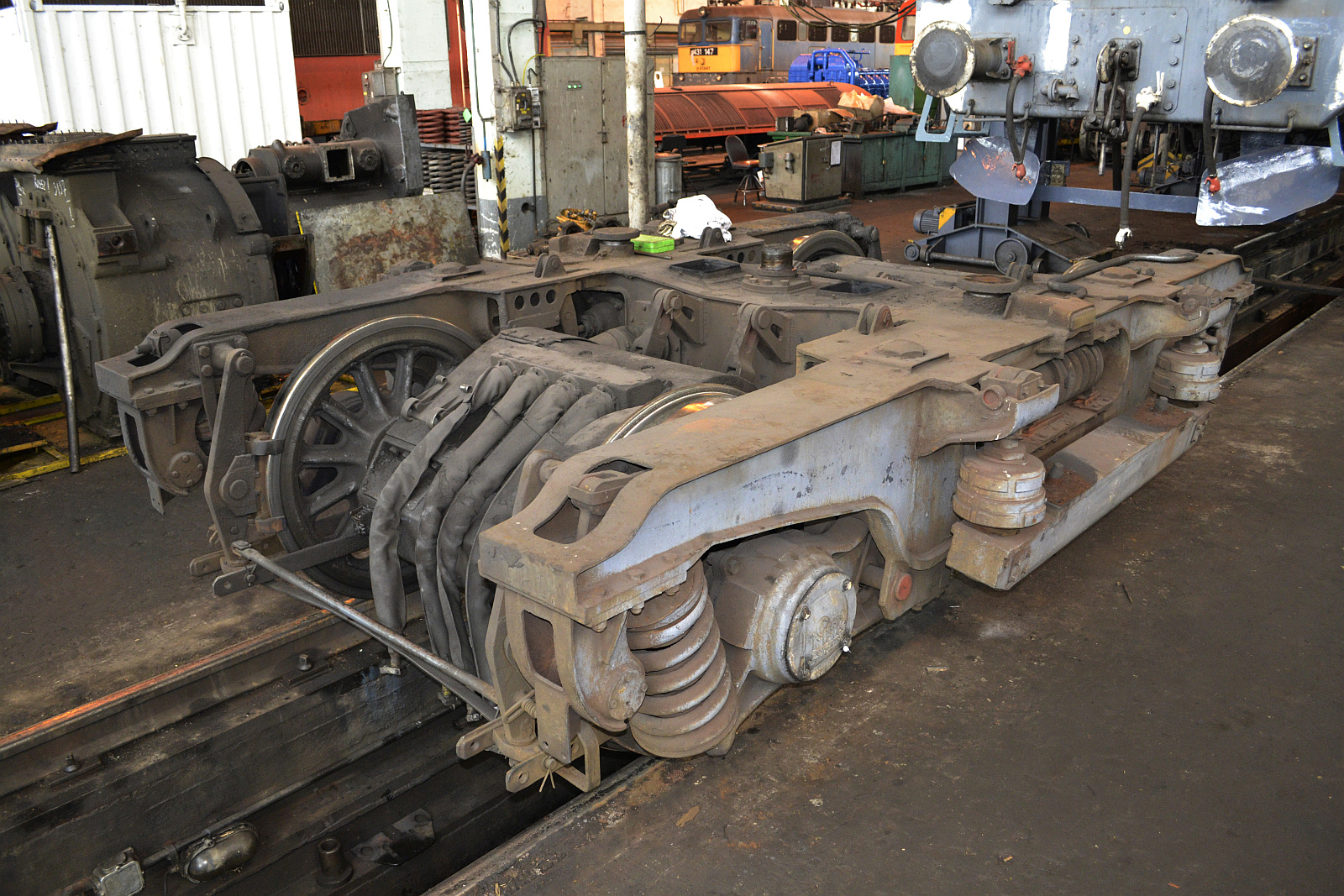 UFB-típusjelű forgóváz egy M40 sorozatú mozdony alól kikötve.